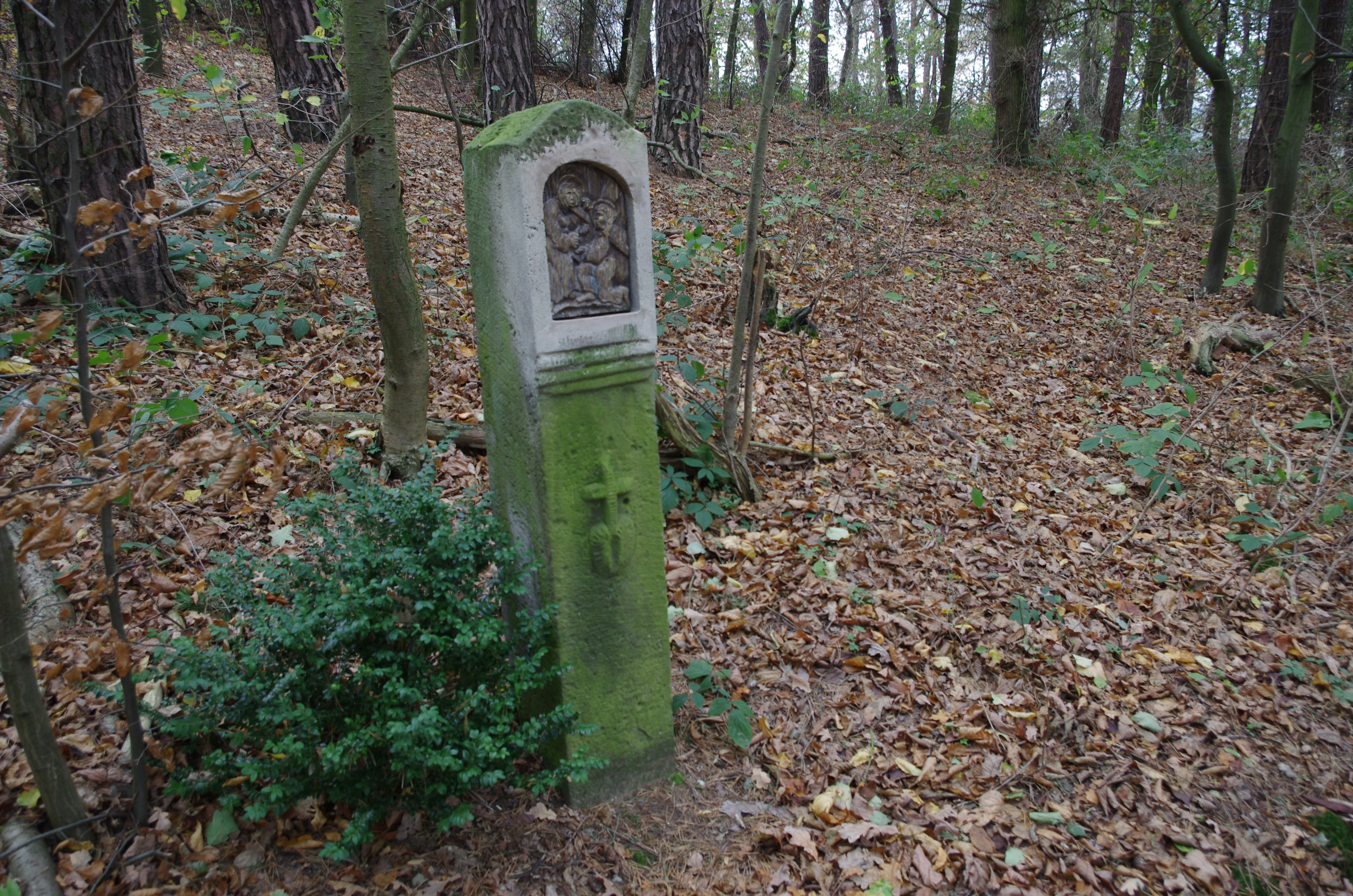 Naumburg in Hessen. Eine Station des Kreuzweges, der sich um die Kapelle befindet.